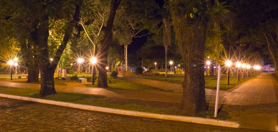 La Plaza libertad, el espacio más importante para la ciudad.